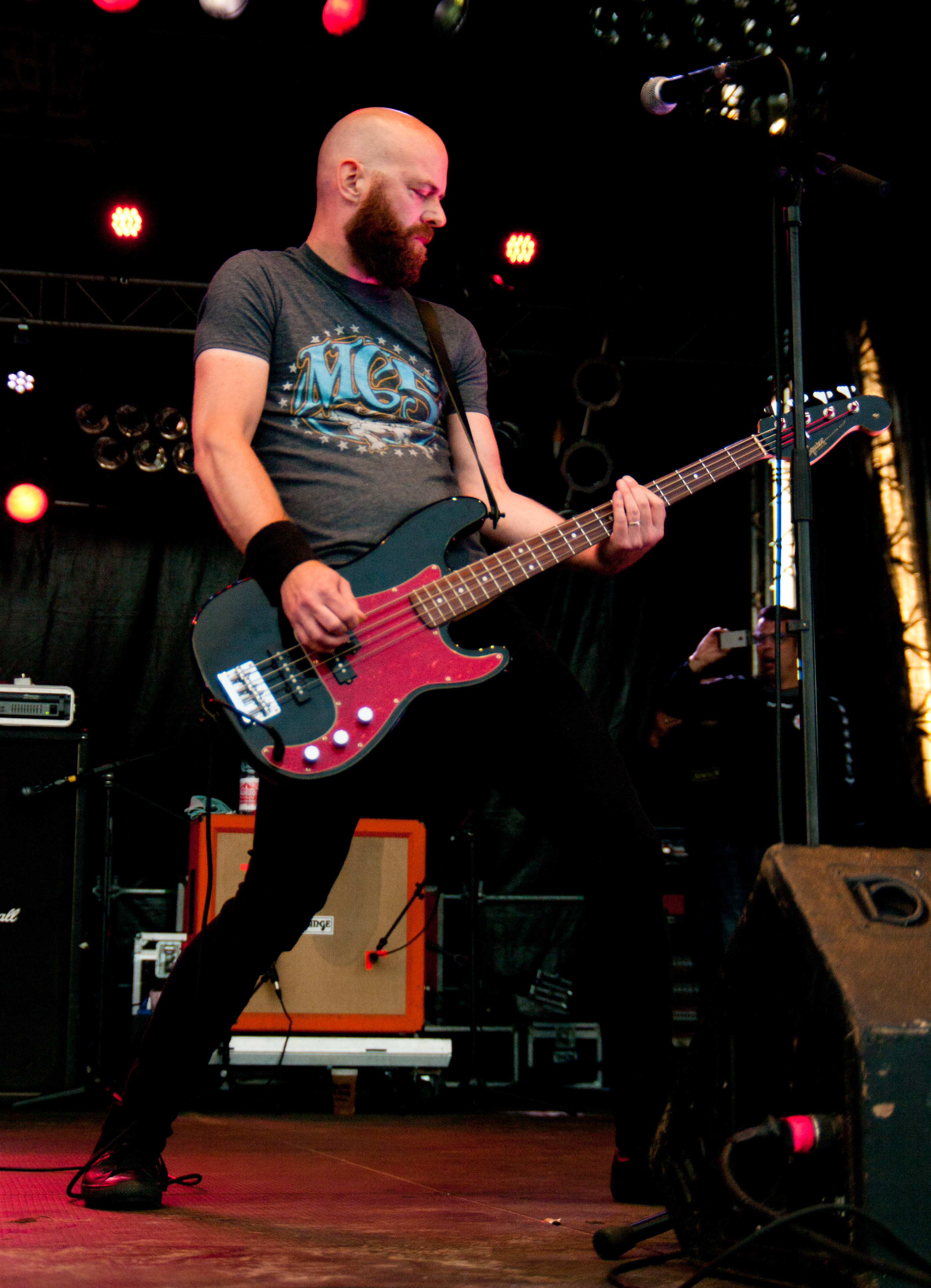 Popperklopper beim Resist to Exist Festival 2017